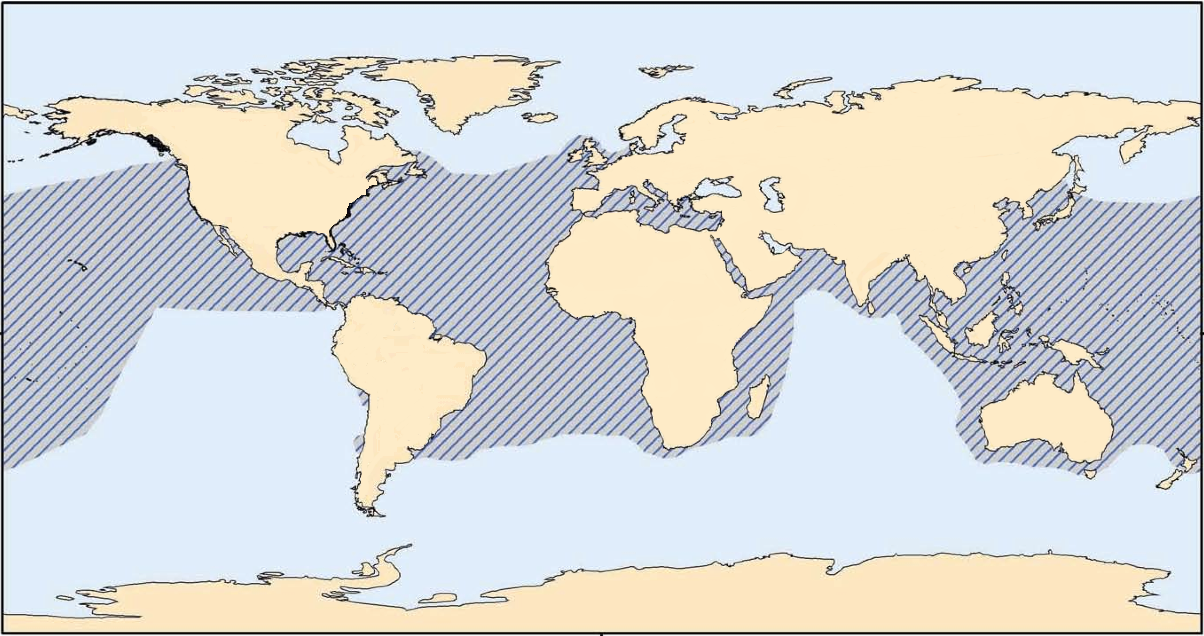 Caretta caretta distribution